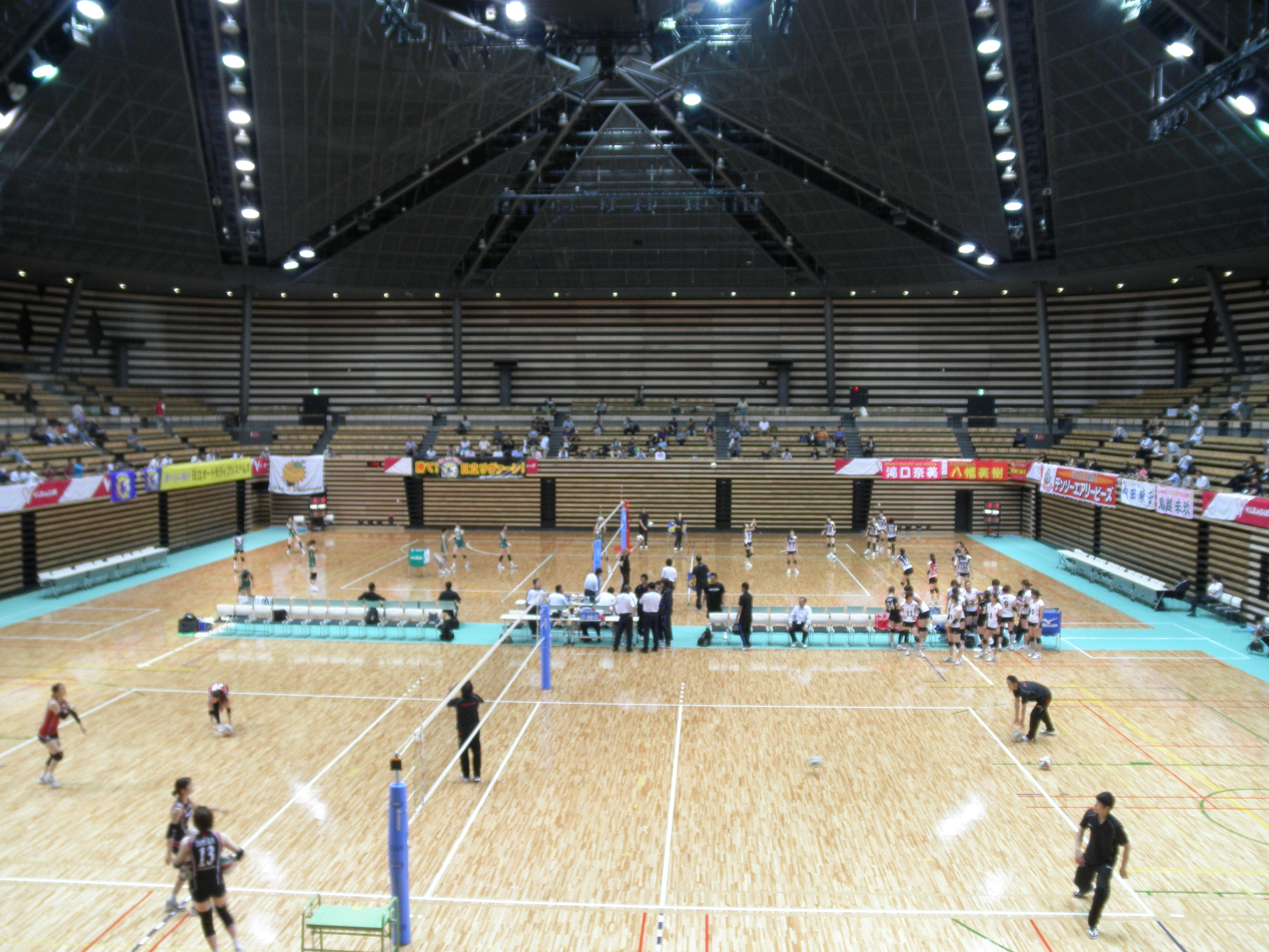 大田区総合体育館アリーナ